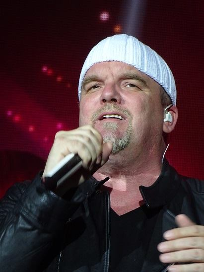 DJ Ötzi; 6. Mai 2016 Hannover "Das Beste der Feste"